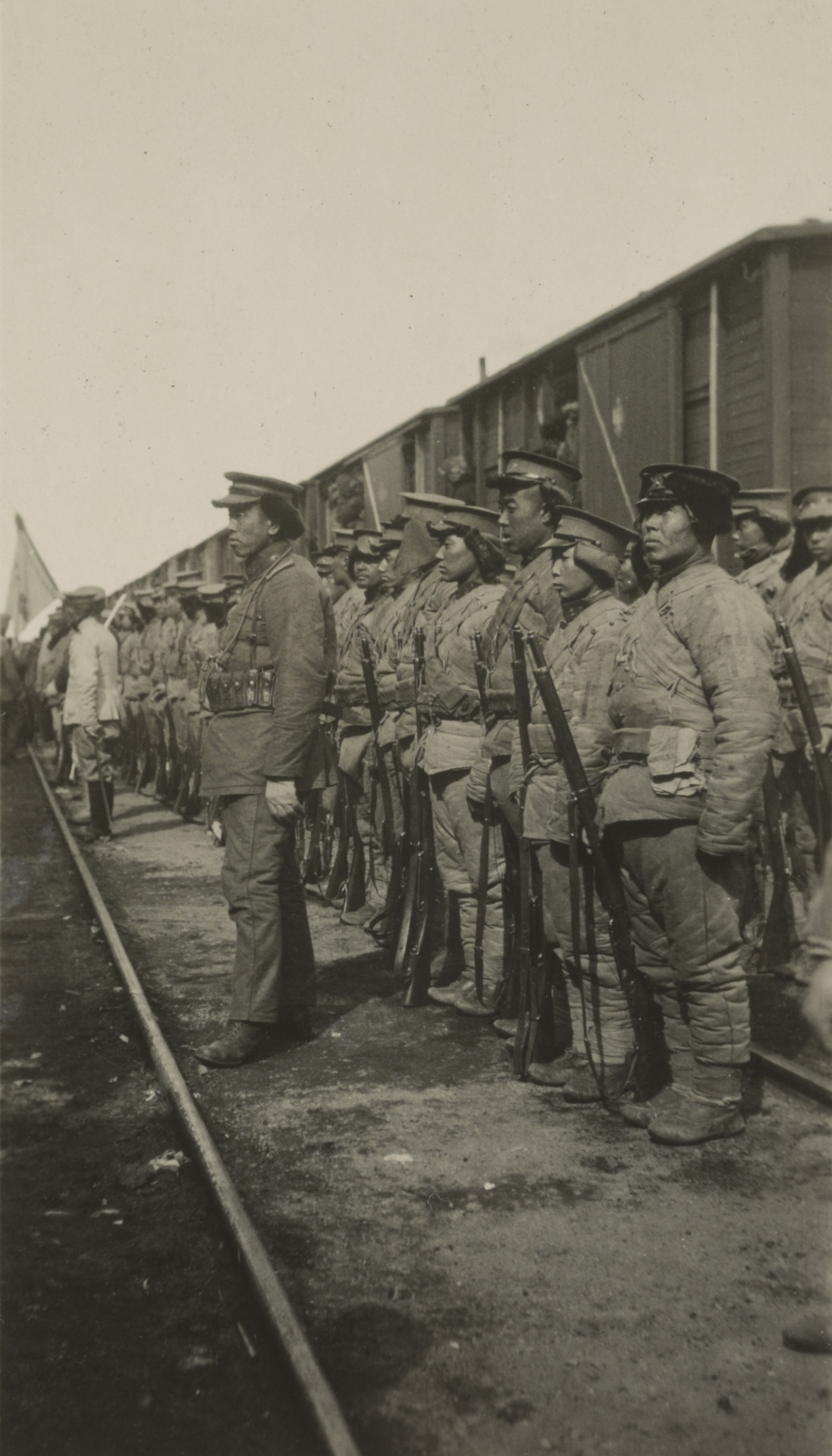 満州の奉天軍閥官兵